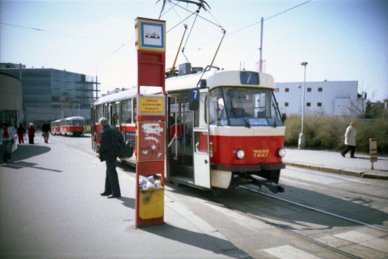 LOMO LC-A Camera photo